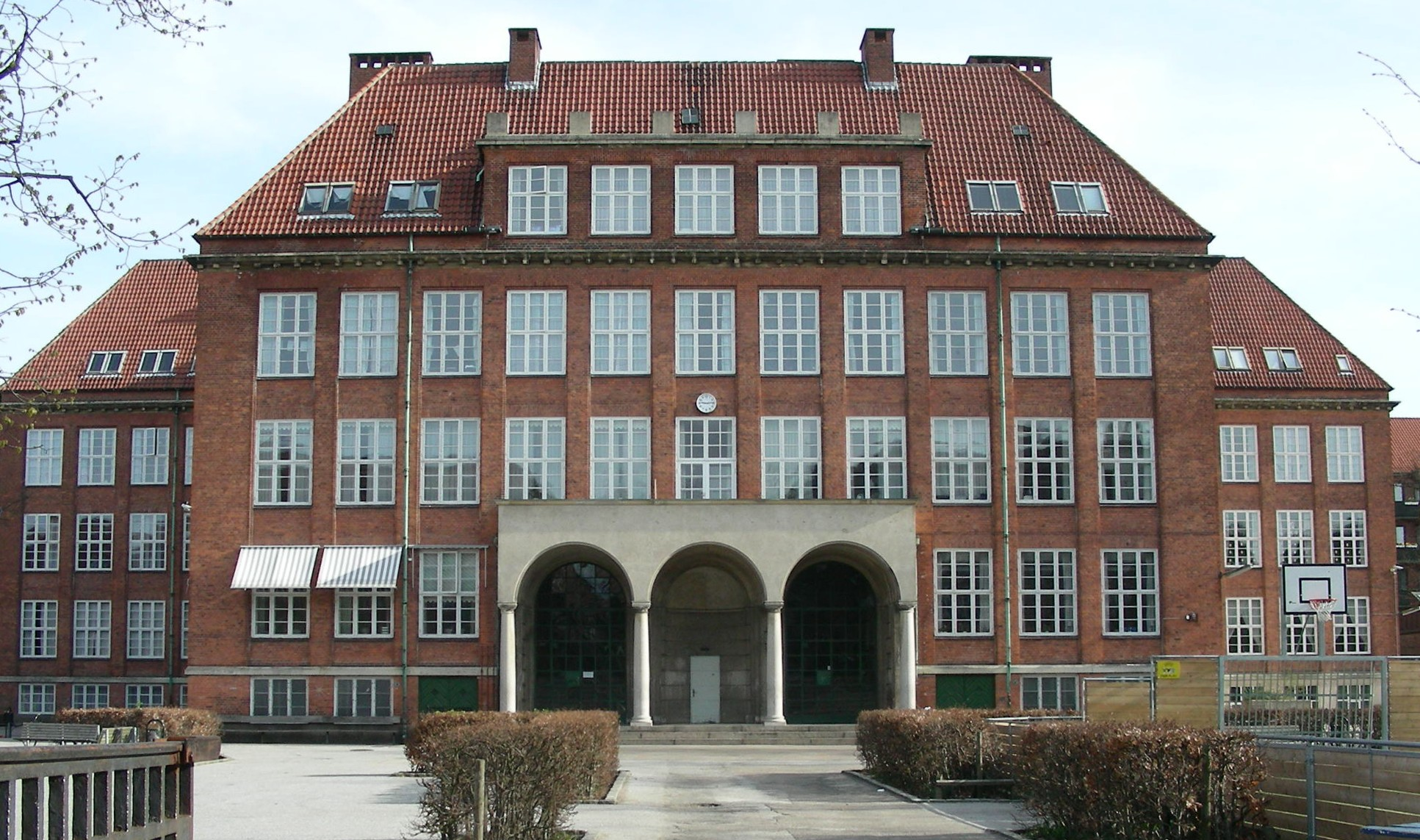 Lindevang Skole, Frederiksberg, Denmark